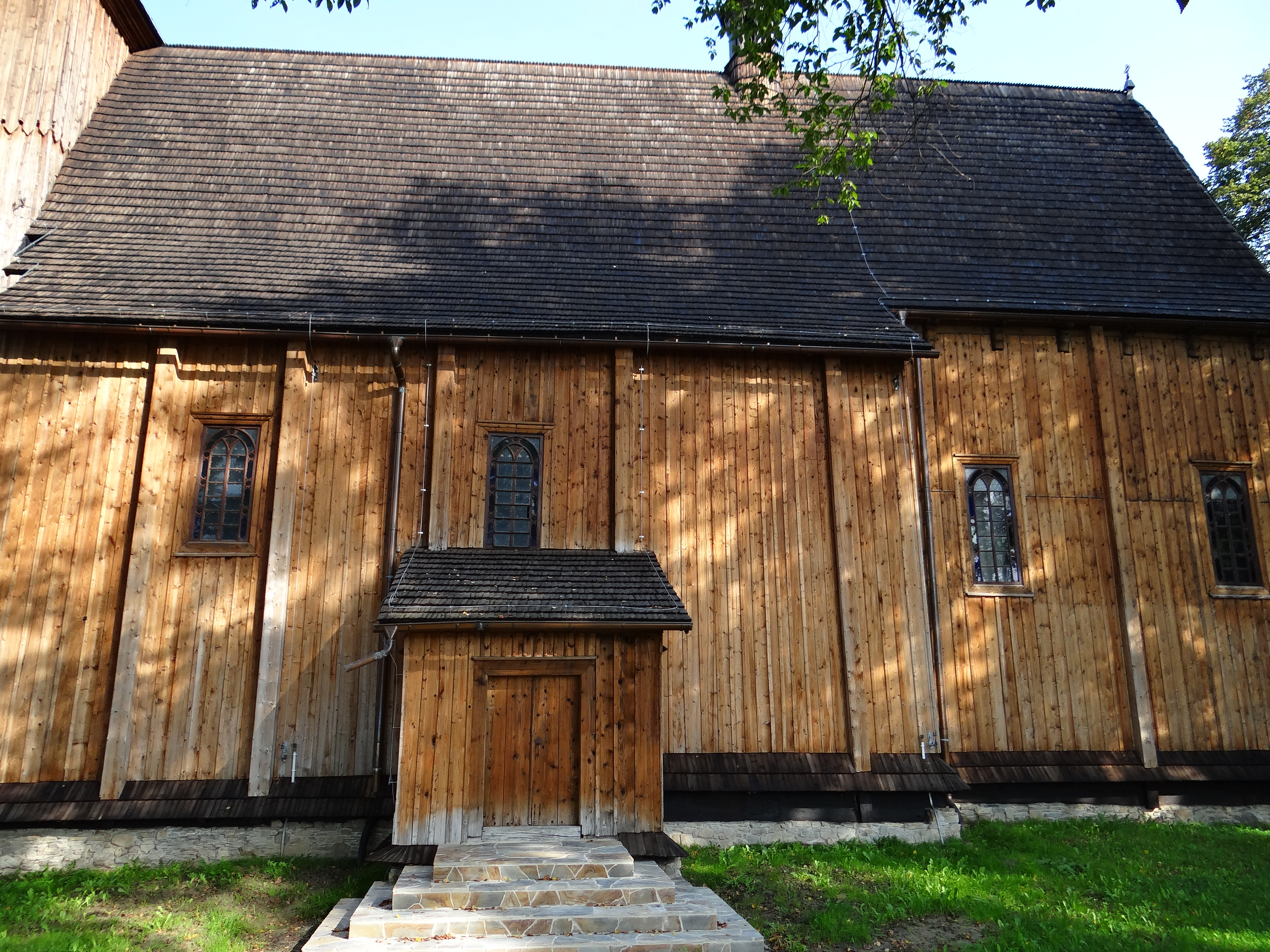 Łęki Górne, kościół par. p.w. św. Bartłomieja, kon. XV, XVII